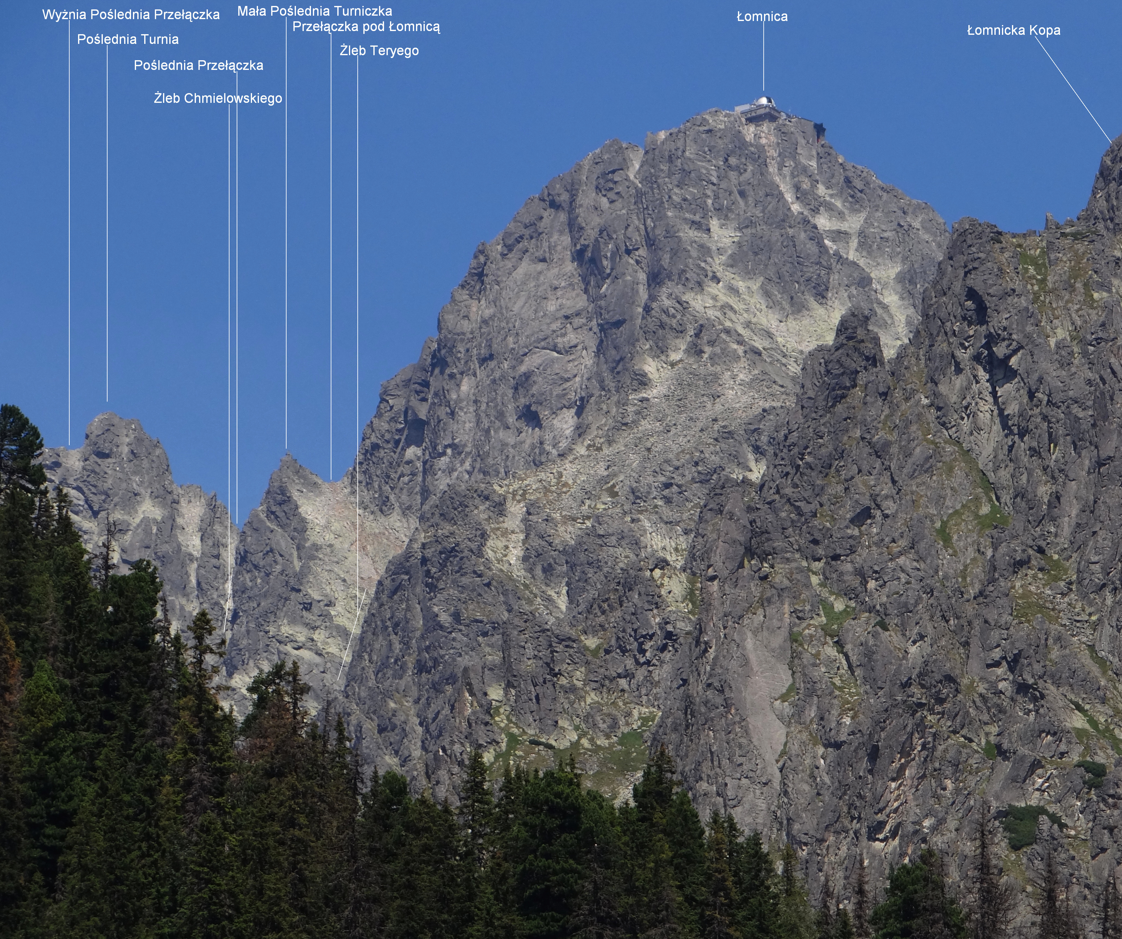 Widok z Doliny Staroleśnej